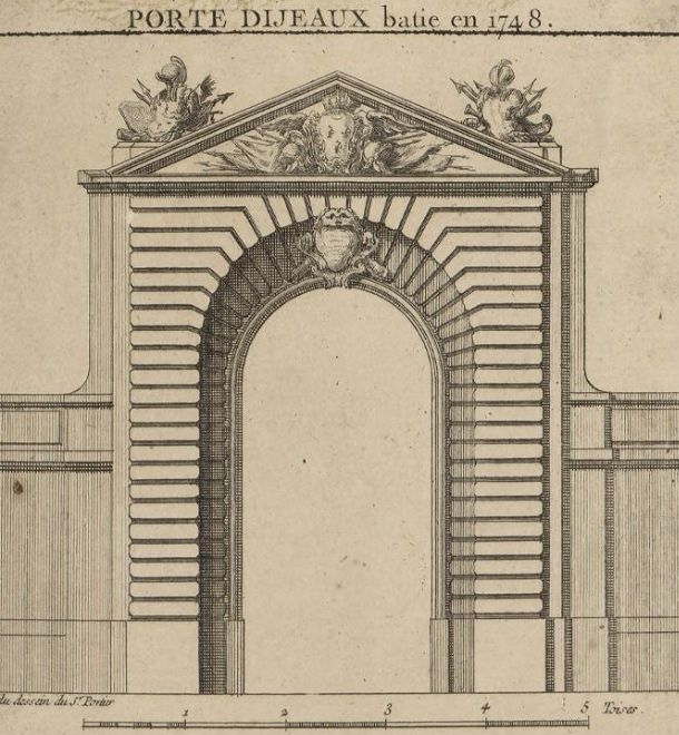 Dessin de l'architecte Portier de 1748 ; cartouche du plan de Lattré de 1755